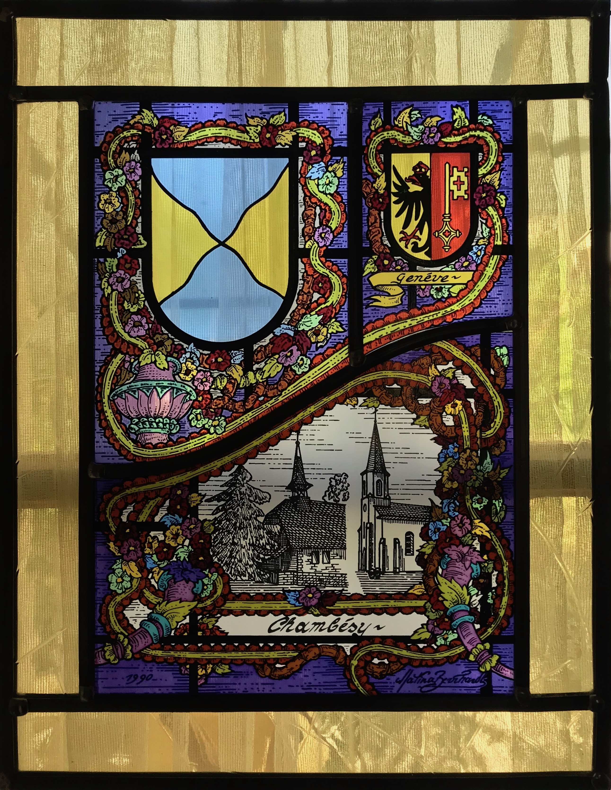 Vitrail fêtant les 200 ans de la commune Genevoise de Pregny-Chambésy, en Suisse.